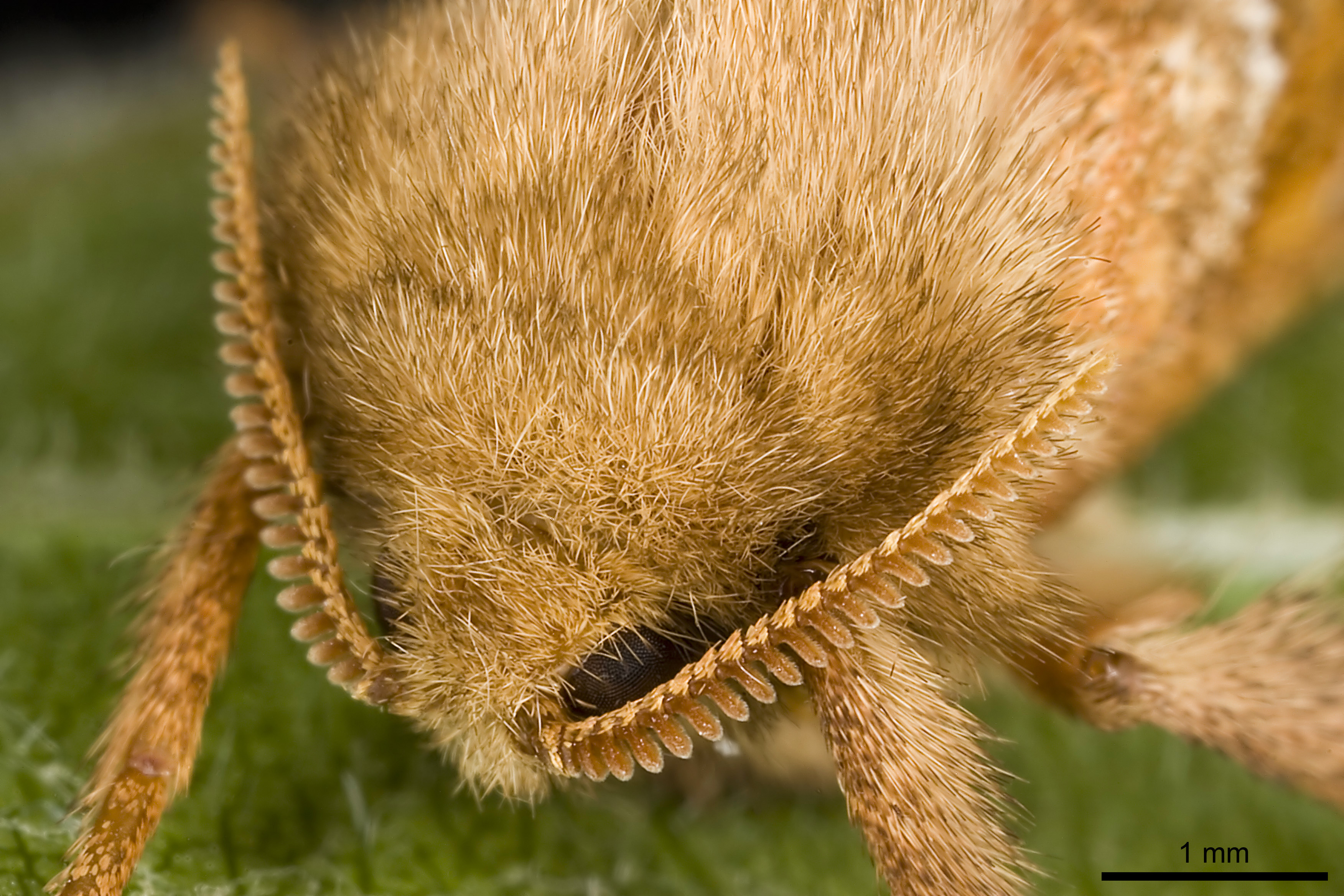 Triodia sylvina head detail